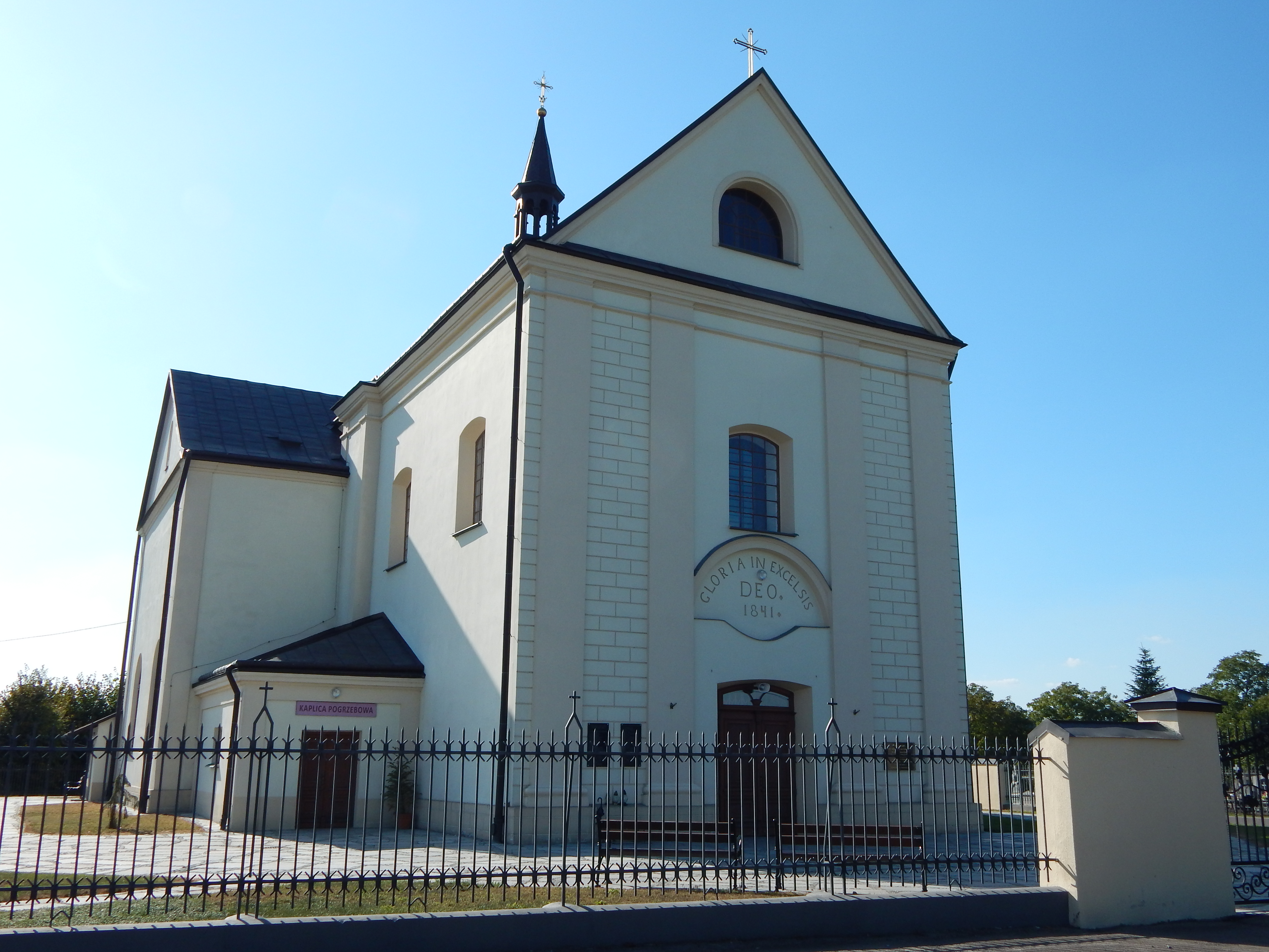 Kuryłówka, Kościół św. Józefa w Tarnawcu